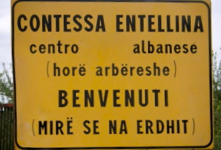 Contessa Entellina, centro albanese di Sicilia, presenta alcune tabelle bilingue in italiano e in albanese. Il Comune di Contessa Entellina (Bashkia e Kundisës) mira a estendere a tutto il territorio comunale tabelle stradali bilingue, in italiano e nell'albanese locale.